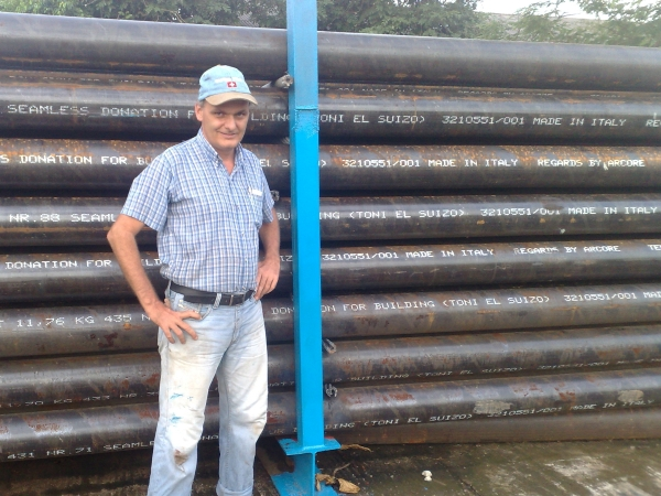 Toni davanti ai tubi donati da Tenaris